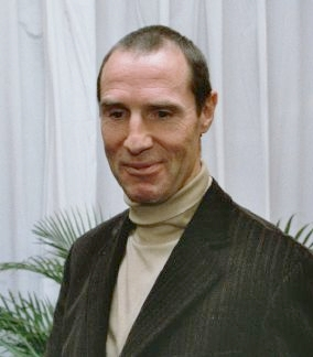 Frank Ullrich, Bundestrainer des DSV-Herren Biathlon Teams